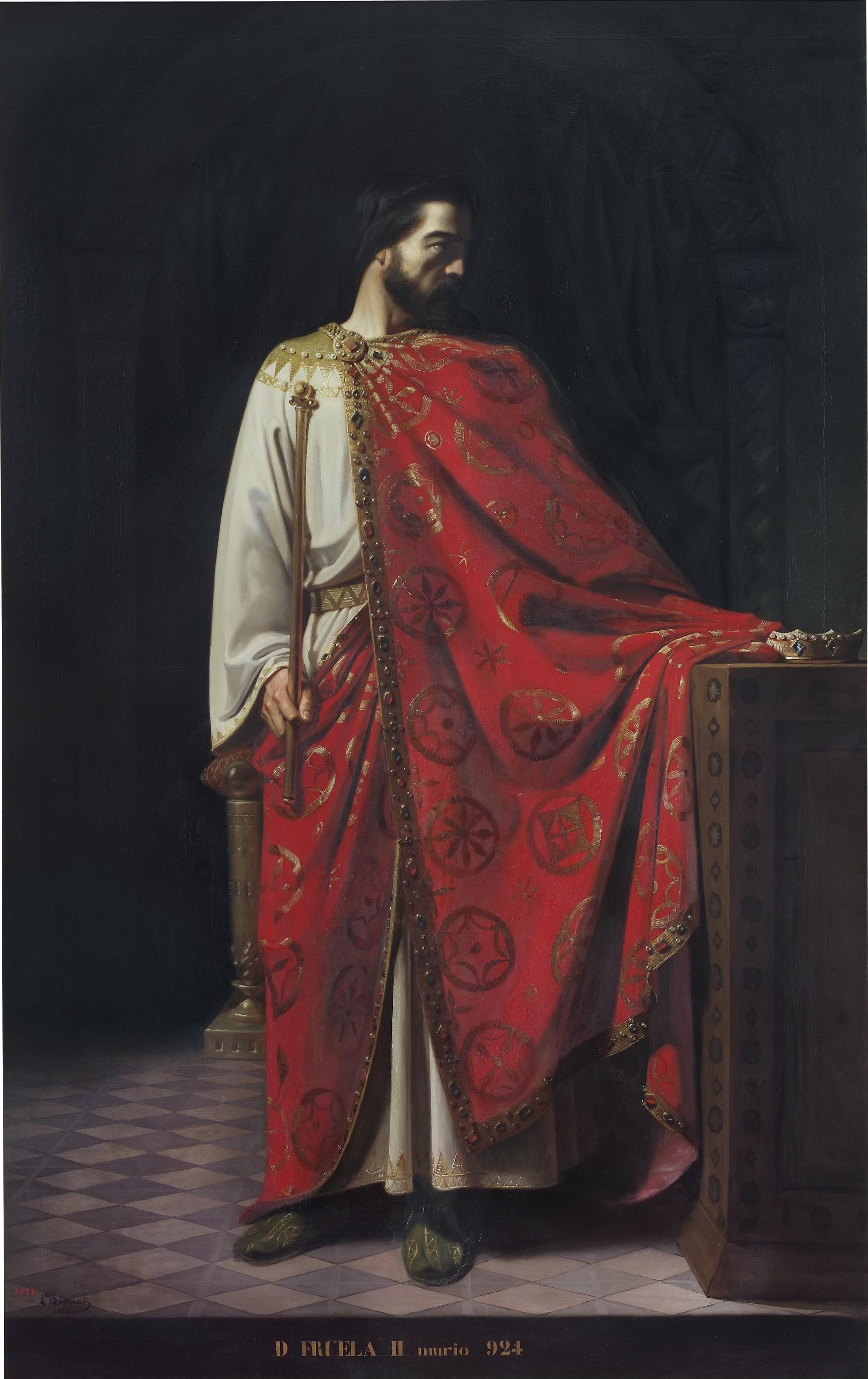 Retrato imaginario del rey Fruela II de León († 925), que fue hijo del rey Alfonso III de Asturias y sucesor de su hermano, el rey Ordoño II de León.